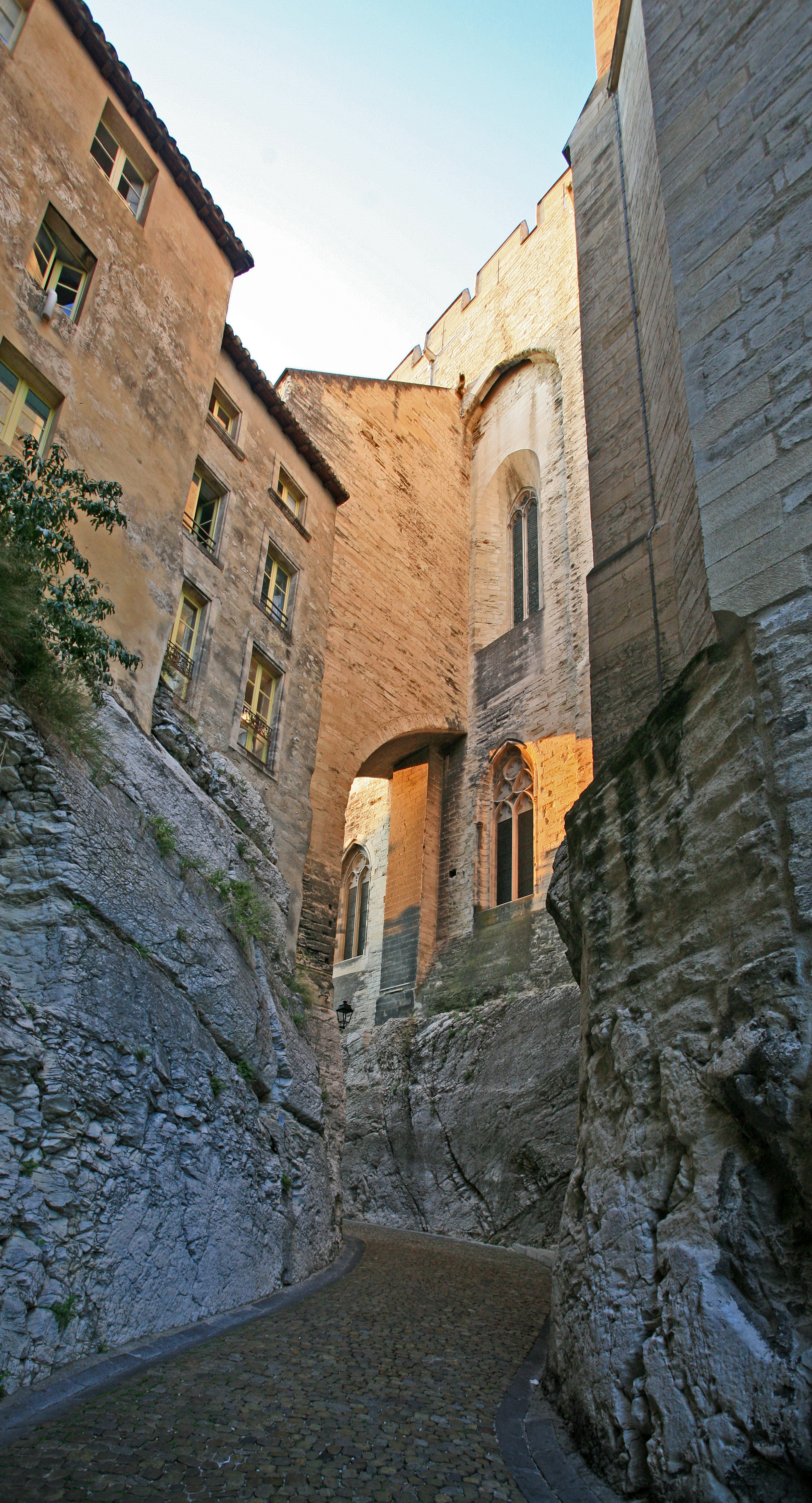 Passage de la Peyrolerie, Palais des Papes, Avignon, Vaucluse, France